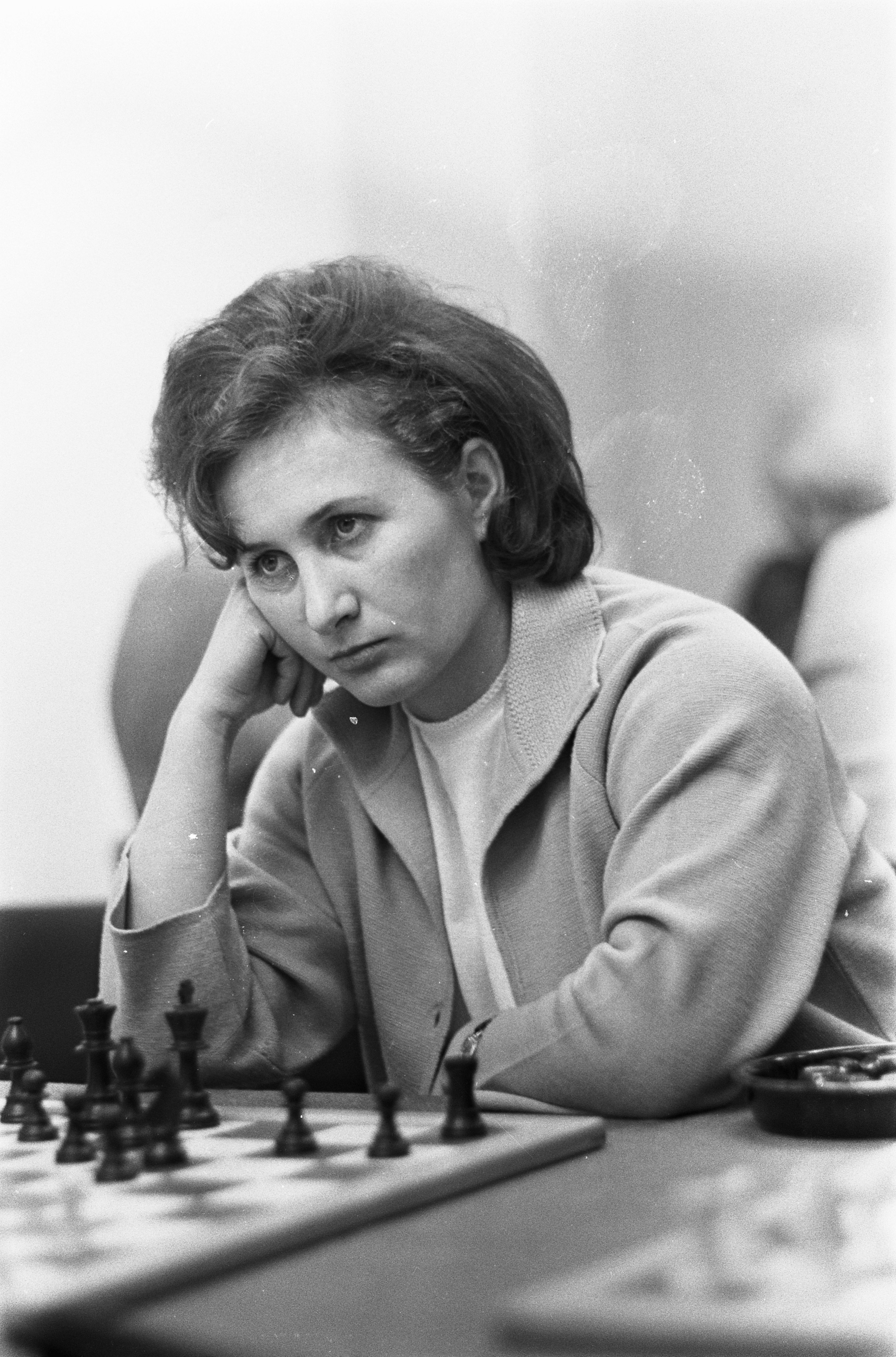 Collectie / Archief : Fotocollectie Anefo Reportage / Serie : [ onbekend ] Beschrijving : Hoogovenschaaktoernooi, de dames van start, mejuffrouw Kozlowskaja uit Rusland Datum : 15 januari 1968 Locatie : Rusland Trefwoorden : schaken Instellingsnaam : Hoogovenschaaktoernooi Fotograaf : Koch, Eric / Anefo Auteursrechthebbende : Nationaal Archief Materiaalsoort : Negatief (zwart/wit) Nummer archiefinventaris : bekijk toegang 2.24.01.05 Bestanddeelnummer : 920-9882